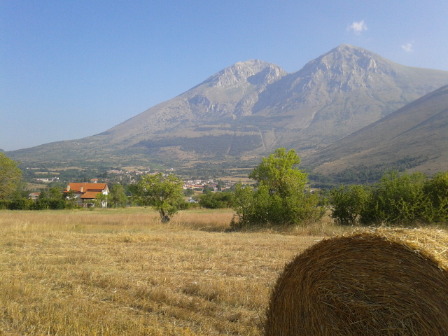 Le vette sorelle del monte Velino